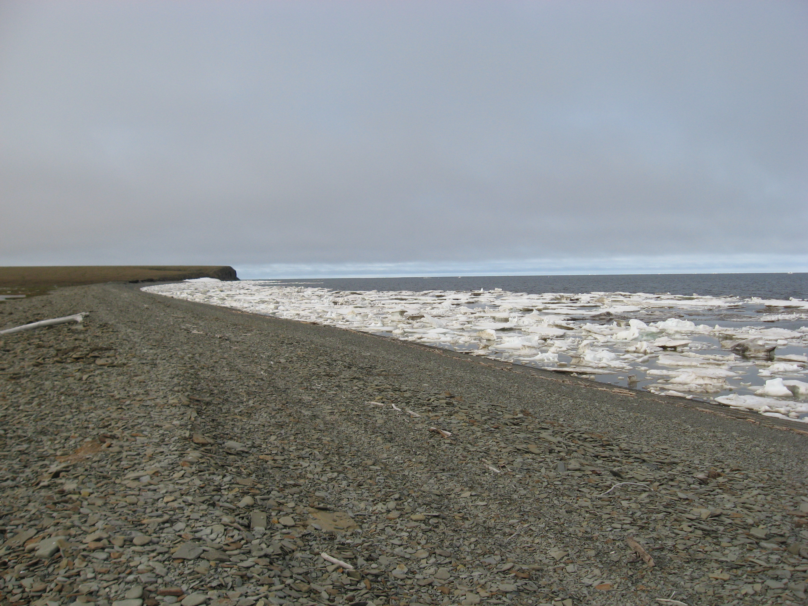 Анабарский залив